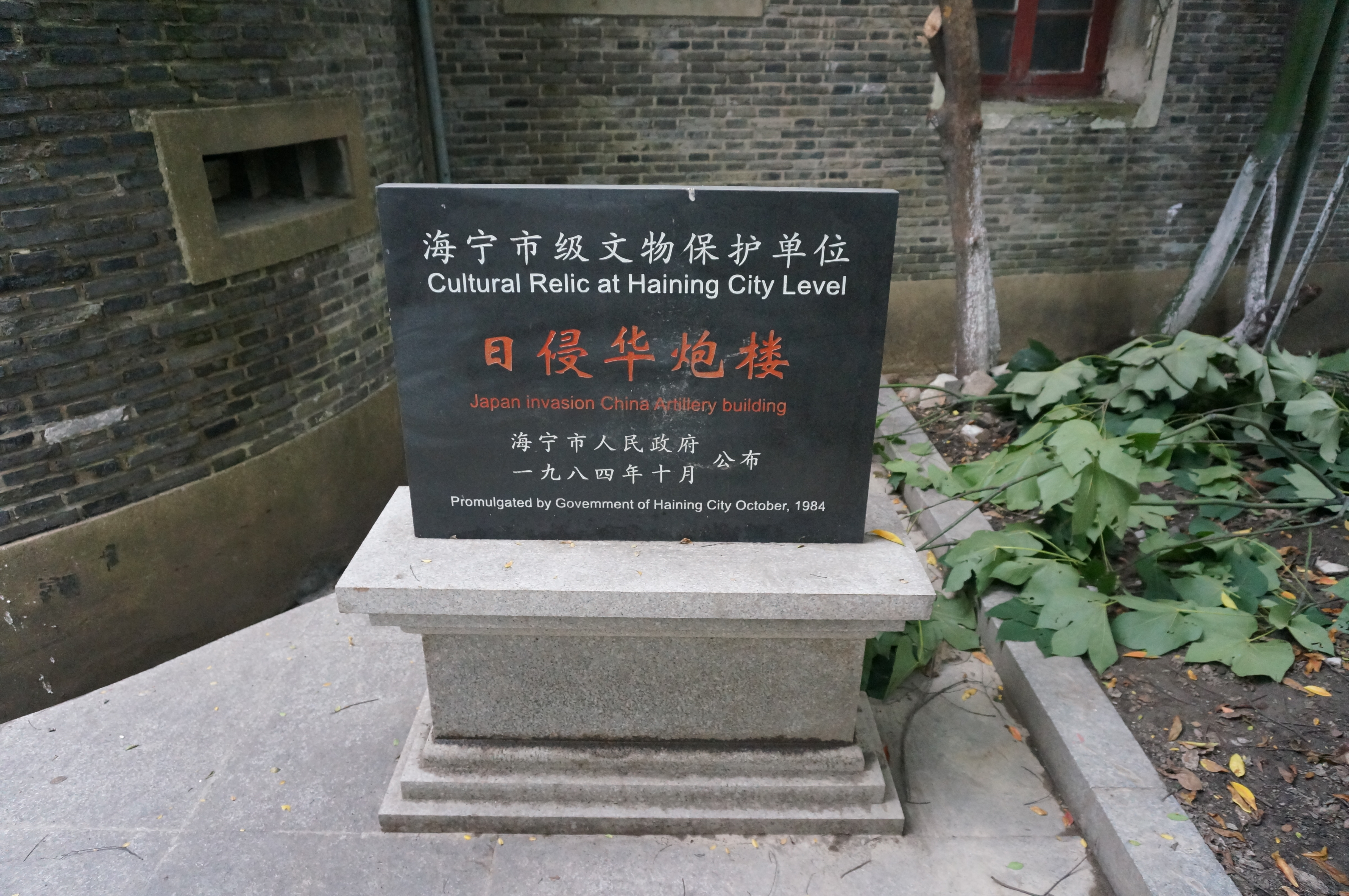 原硖石火车站侵华日军碉堡（炮楼），文保碑。